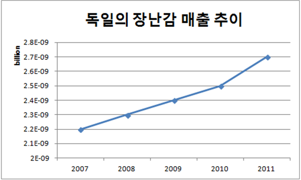 독일의 장난감 산업 매출 규모 추이